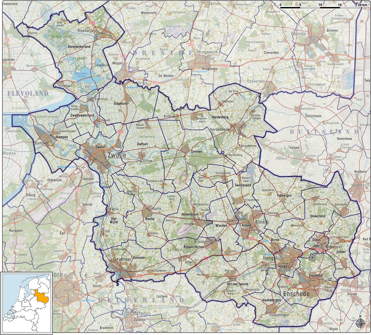 Kaart van de Nederlandse provincie Overijssel, met gemeentegrenzen per 2012 en impressie van het landschap. Referentie-ondergrond (kustlijn, steden, wegen) gerasterd uit de OpenStreet Map OSM. Inhoud is beschikbaar onder de Creative Commons Attribution-ShareAlike 3.0 license. Referentie-ondergrond op water bewerkt vanuit Gebruik is vrij met bronvermelding NLR en ESA. Vectorgrenzen van gemeenten op basis van het vrij te gebruiken geo-bestand van het CBS. Hoogte-aanduidingen (reliëf) gerasterd uit de AHN Viewer ( gebruik is vrij met bronvermelding (c) AHN, Overige kenmerken op de kaart: eigen tekenwerk.